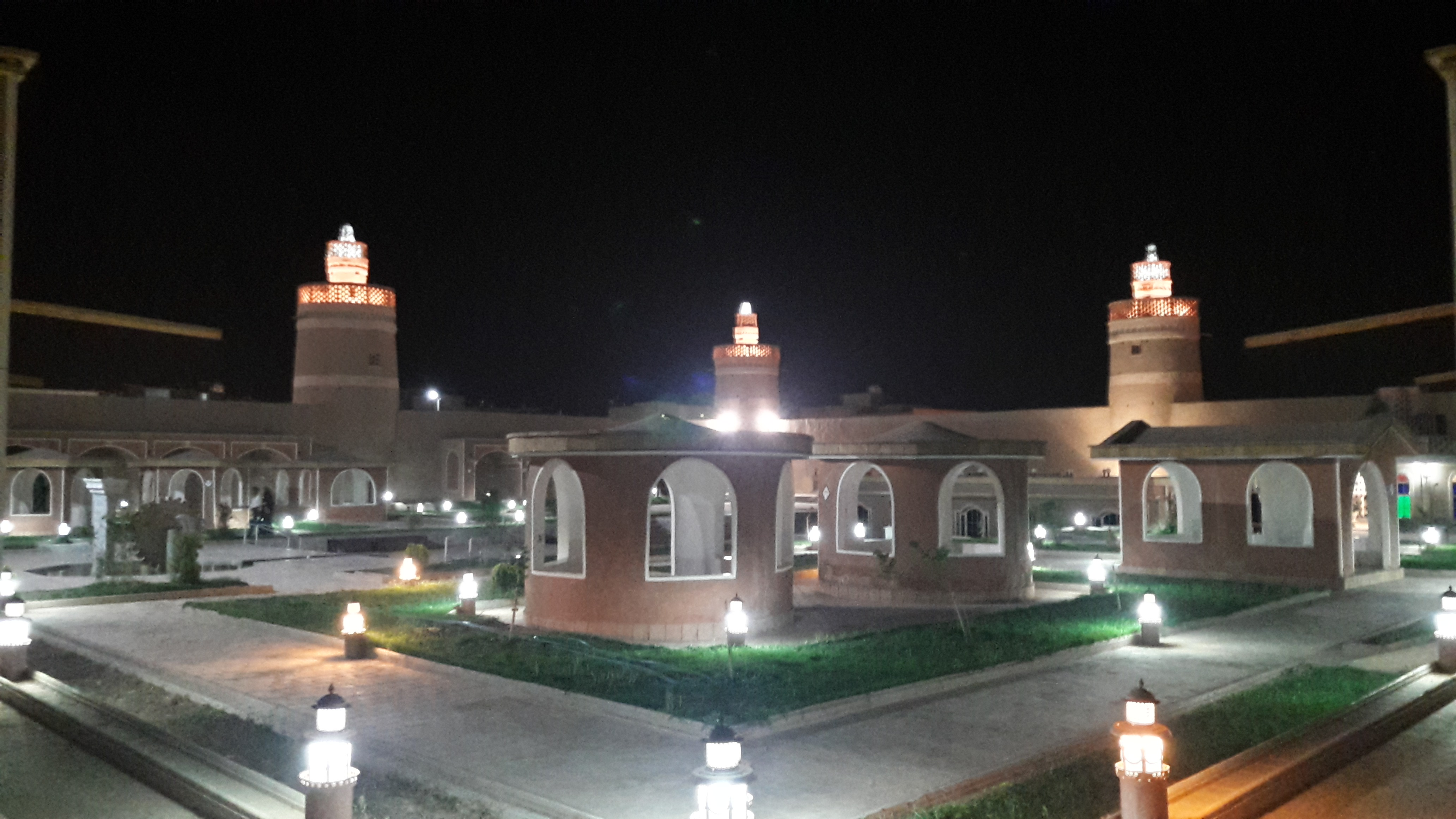 برج کبوترخانه‌های باغ قلعه جوی خارون